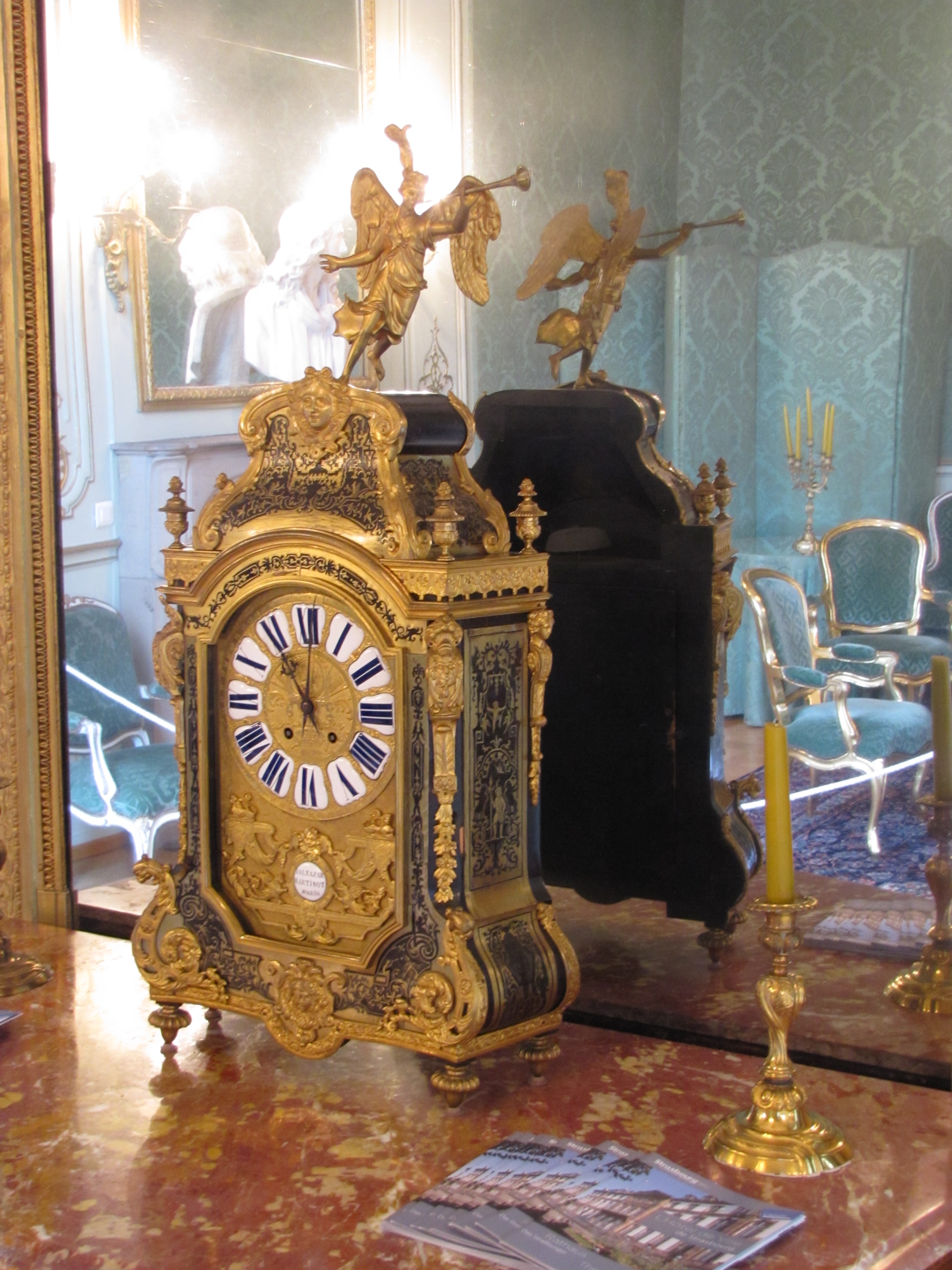 Alsace, Bas-Rhin, Strasbourg, Ancien Hôtel des Comtes de Hanau-Lichtenberg (1736), puis Hôtel de Ville, place Broglie et 9 rue Brûlée: Horloge Balthazar Martinot (XVIIIe).